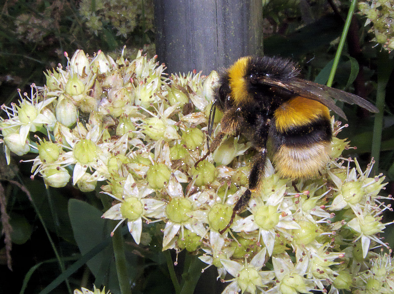 Bombus terrestris, Gewone aardhommel on Sedum